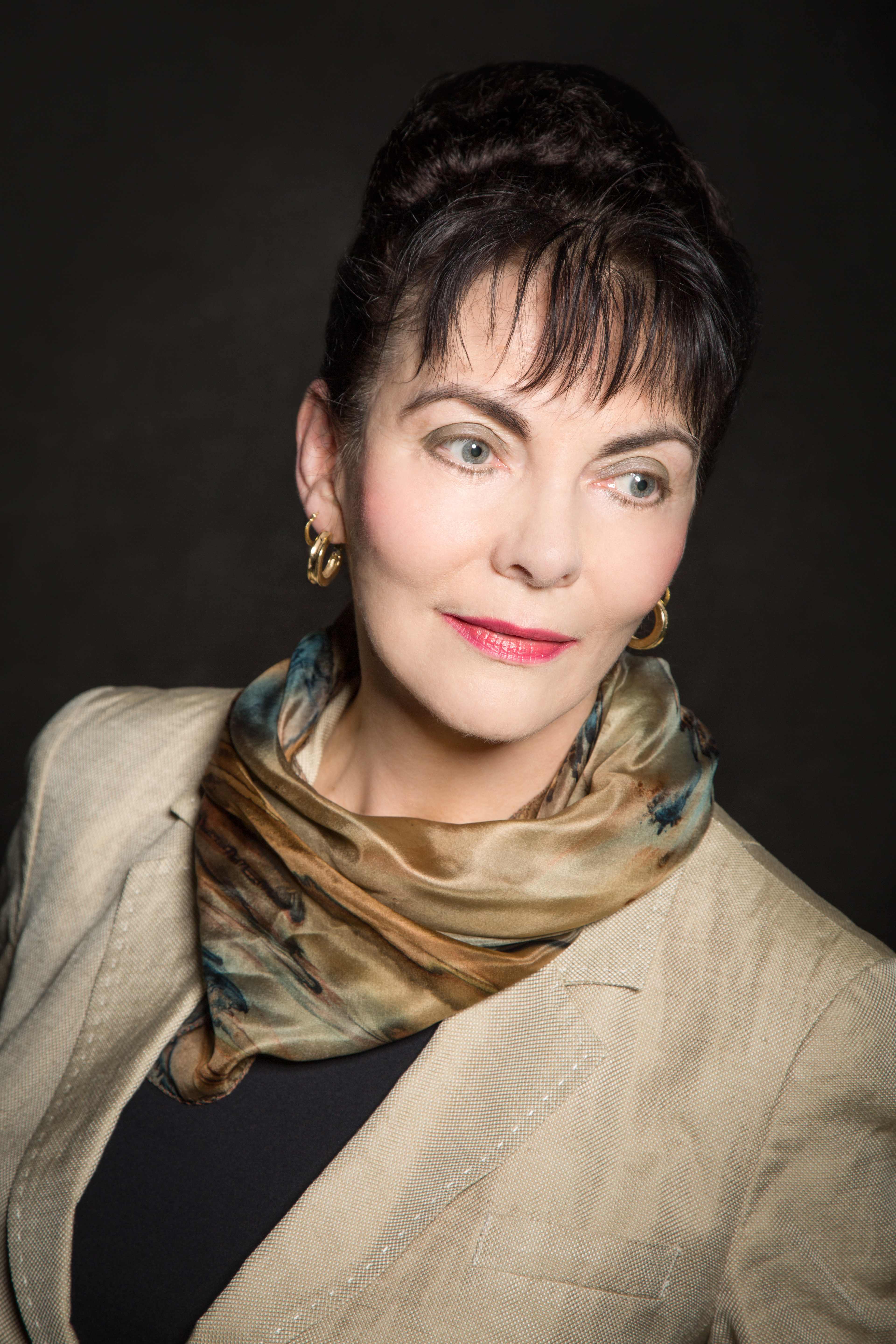 Foto zum Artikel